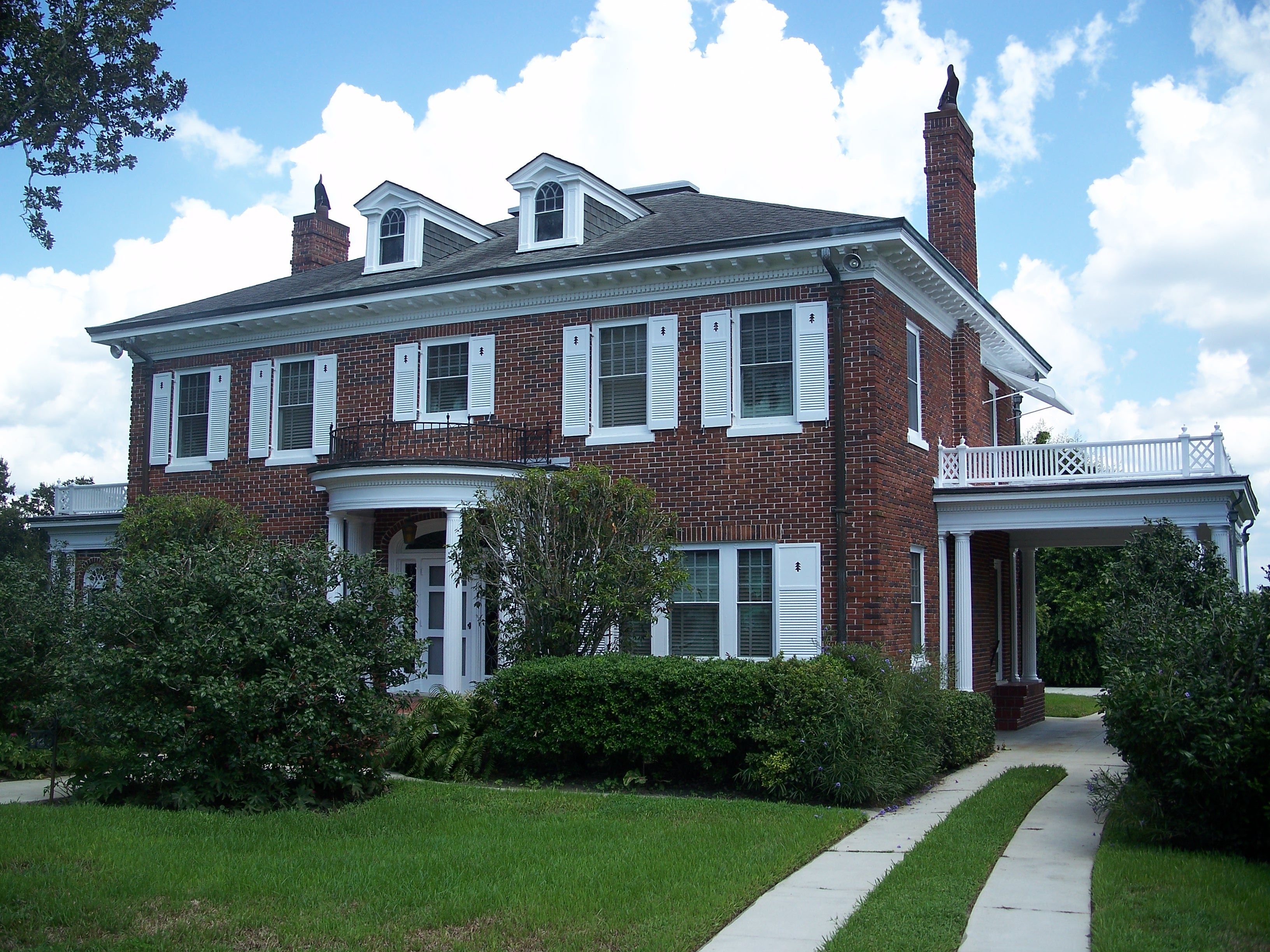 Wheeler-Evans House, in Oviedo, Florida